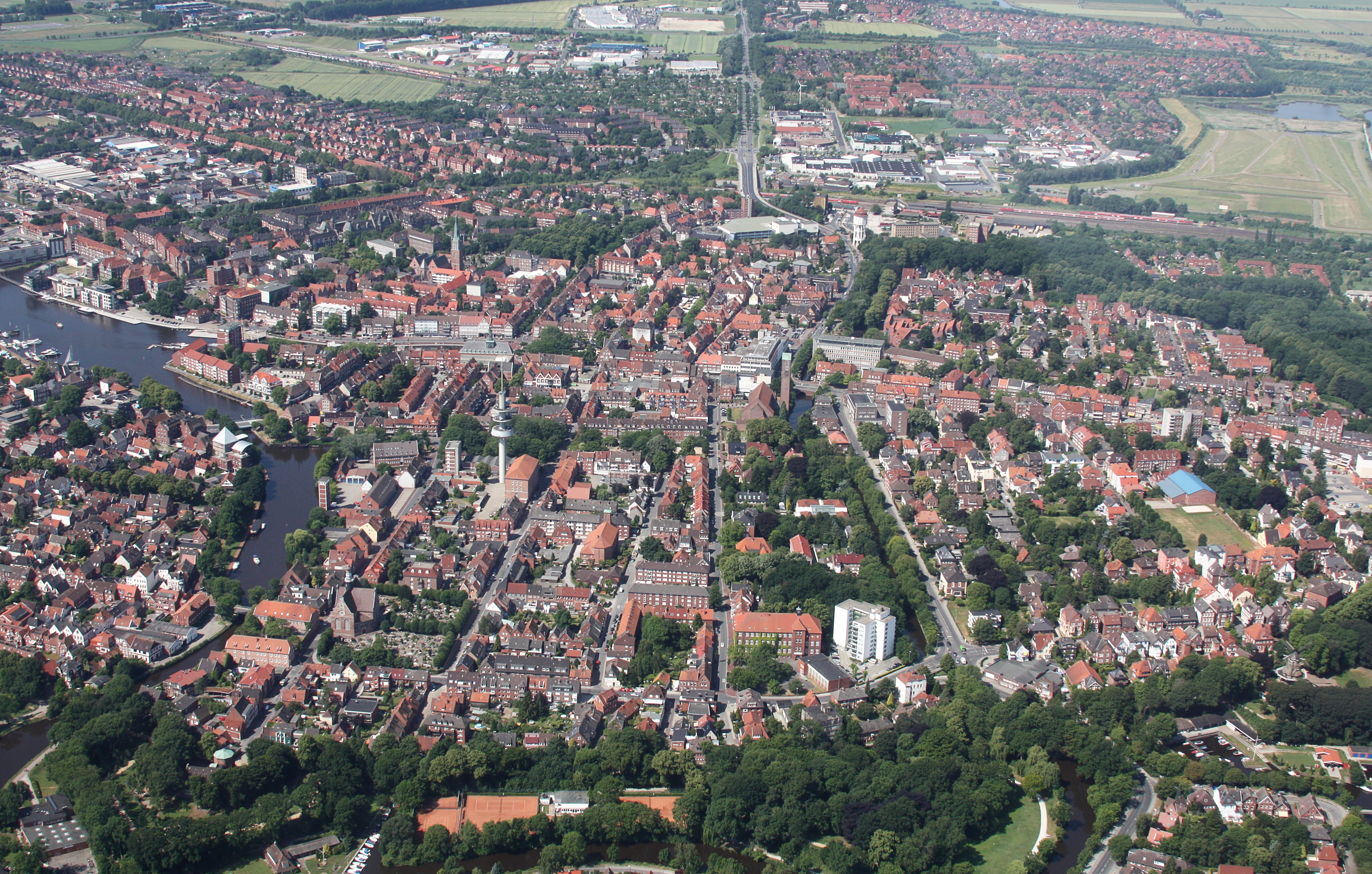 Flug über Emden; Flughöhe 1500 ft; Juli 2010; Originalfoto bearbeitet: Tonwertkorrektur und Bild geschärft mit Hochpassfilter